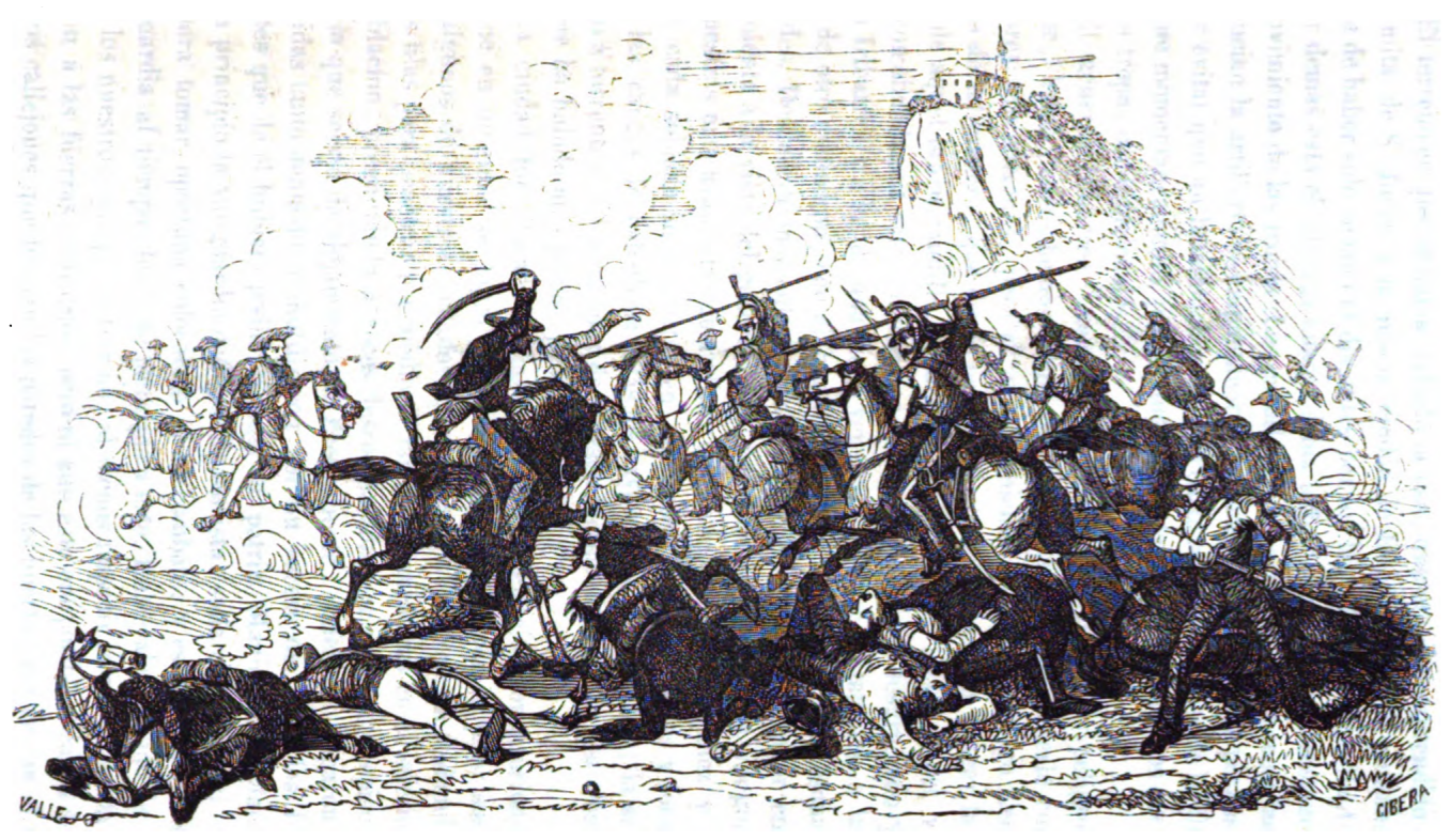 Choque entre la caballería isabelina y la carlista en la batalla de Huesca, 24 de mayo de 1837